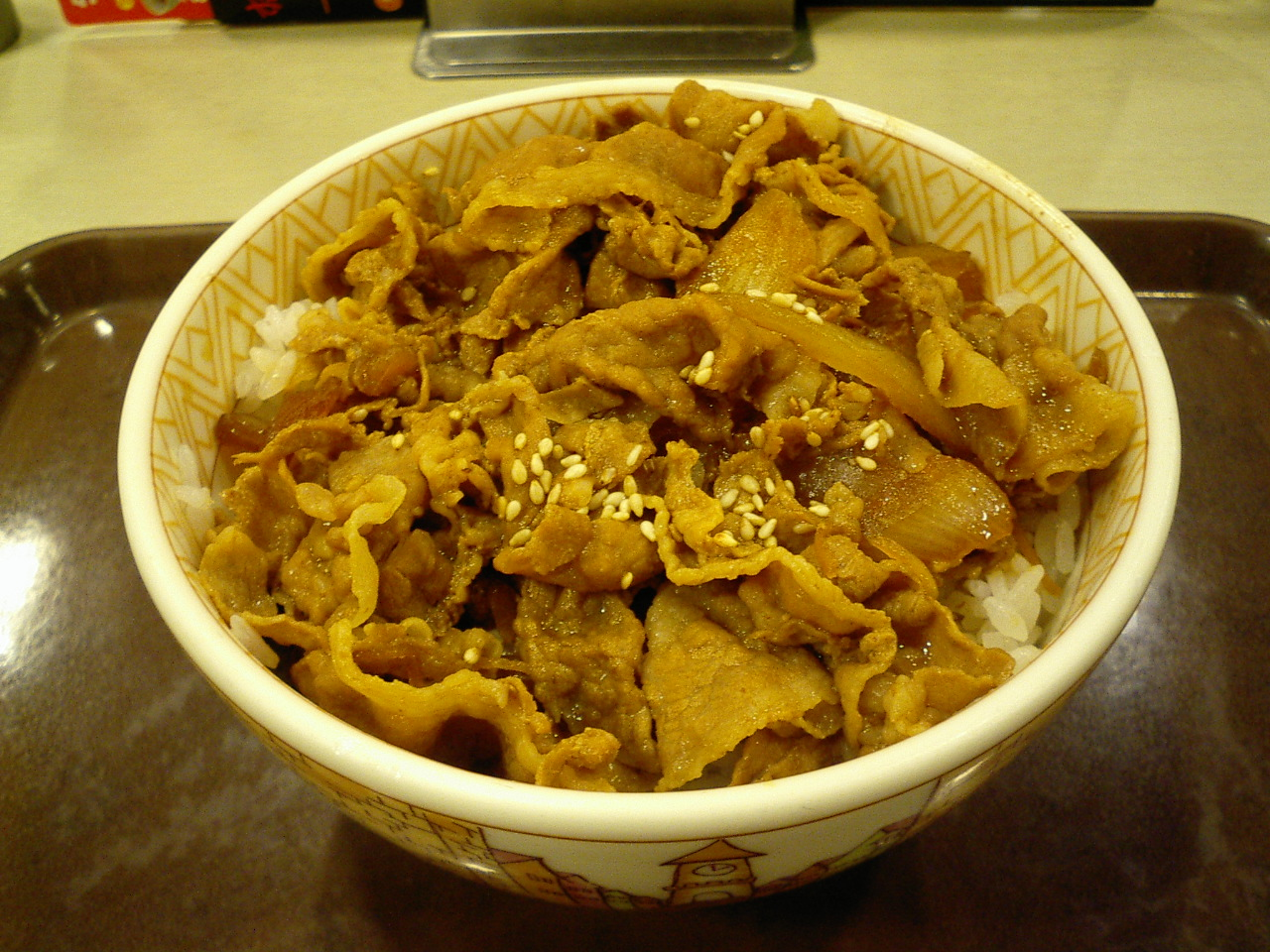 Butadon / Tondon